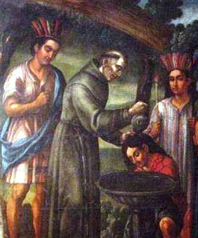 Recorte de cuadro: "Fray Jodoco Ricke bautiza a los indìgenas", siglo XVII.